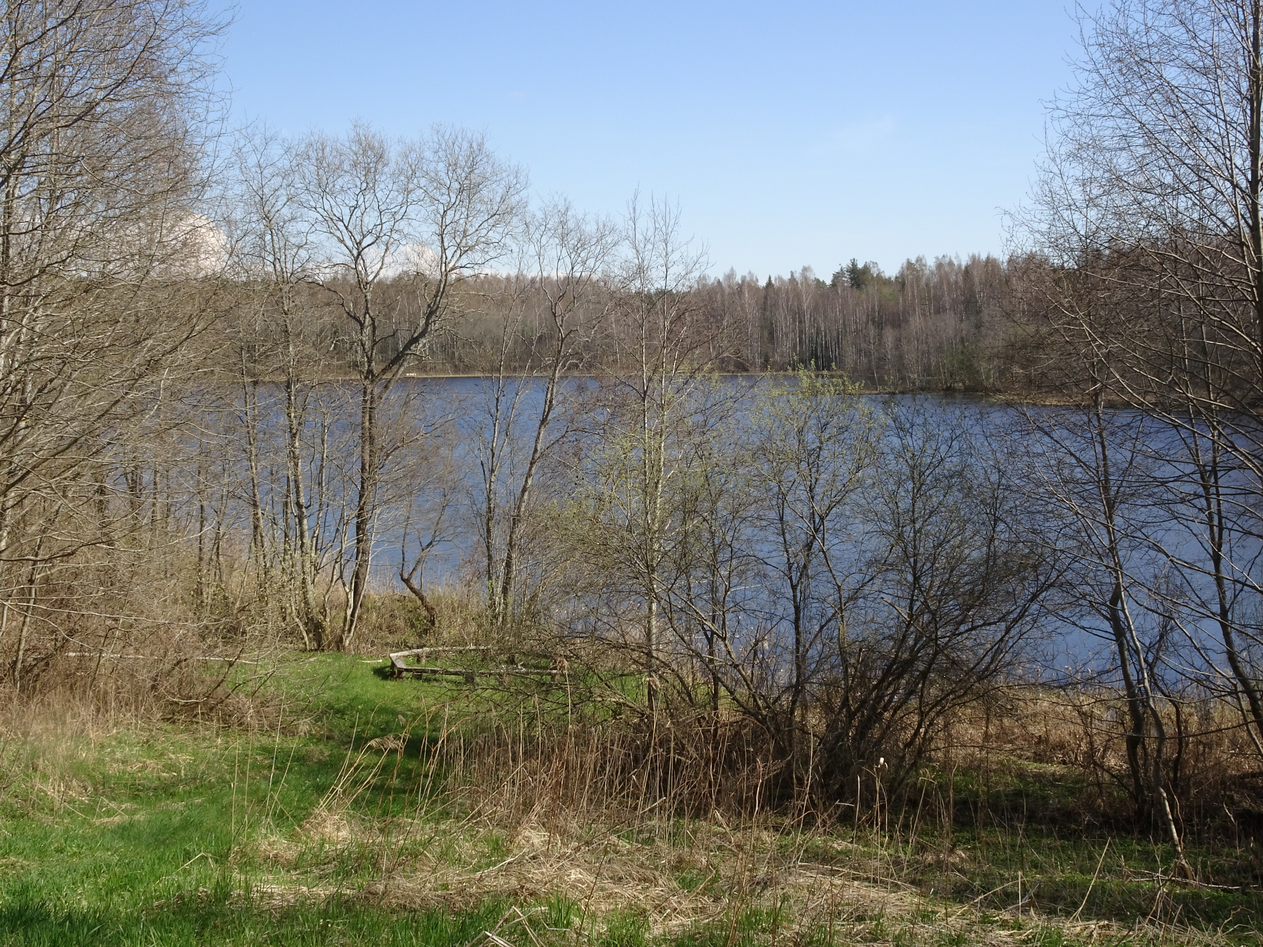 Janokjärv, Põlvamaal